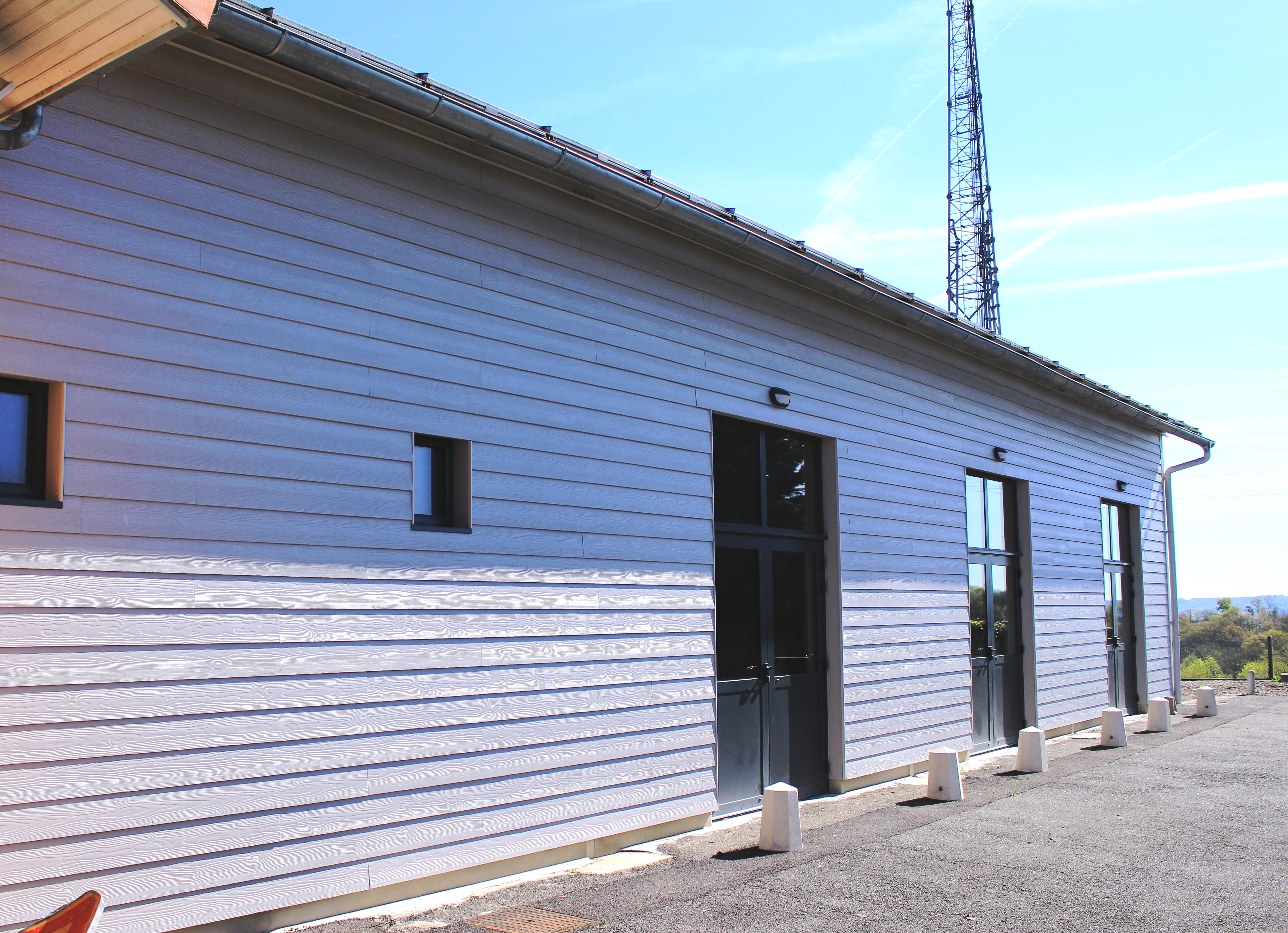 Salle des fêtes de Lizos (Hautes-Pyrénées)